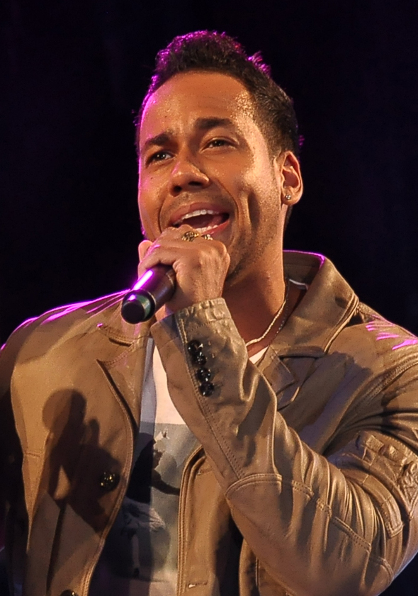 Anthony Romeo Santos junto a Juan Luis Guerra, Estadio Olímpico, Santo Domingo 2012